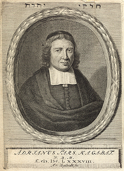 Adriaan Pars (1641-1719)